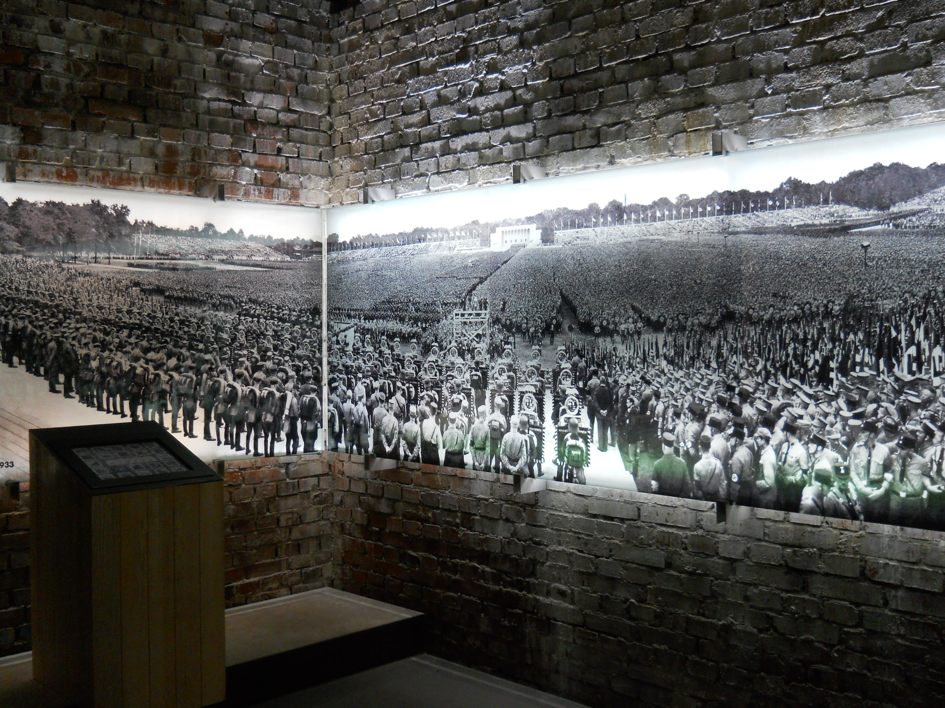 Nuremberg Germany 125 Dokumentationszentrum Reichsparteitagsgelände (26)